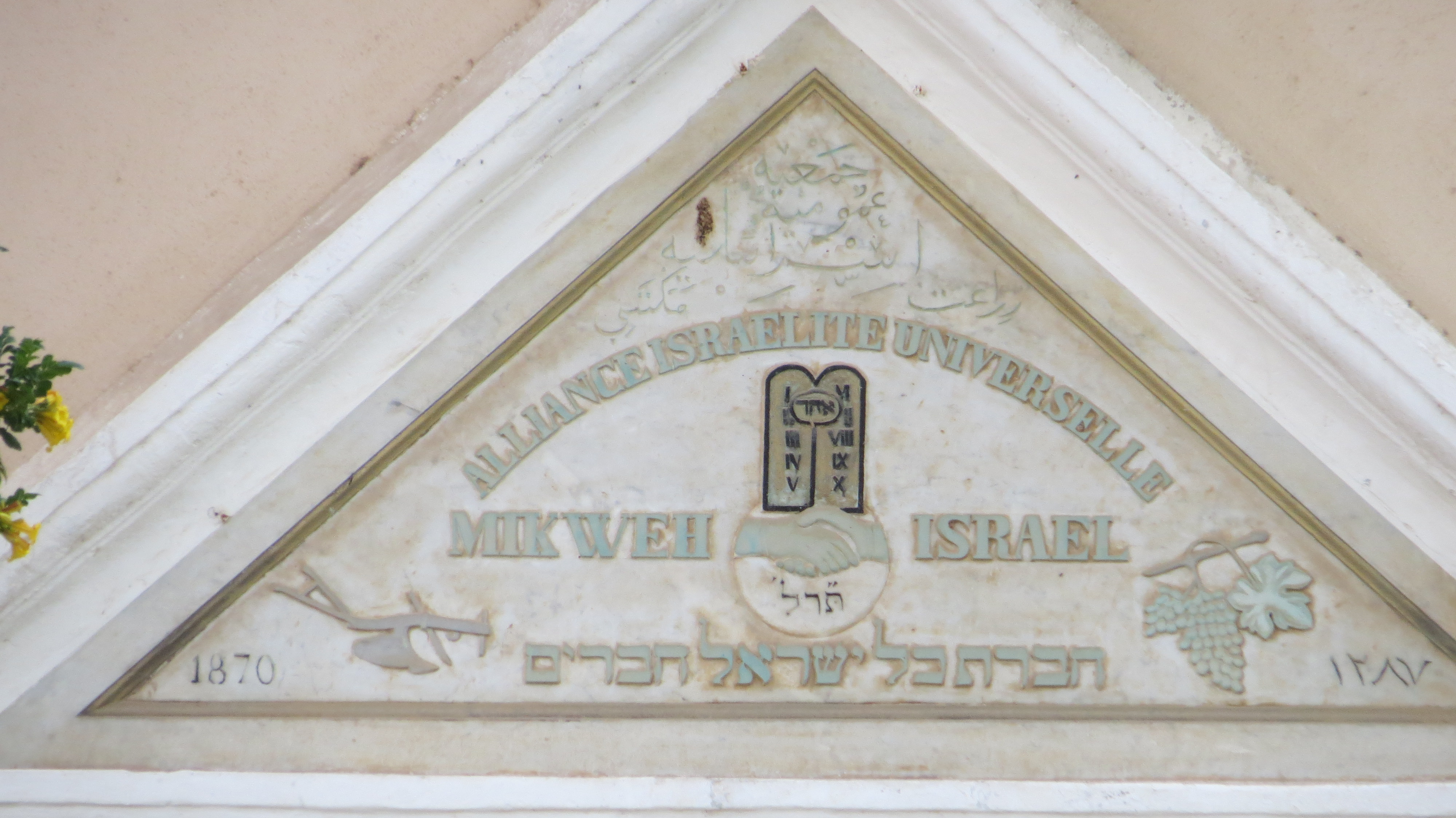 Mikveh Israel מקוה ישראל